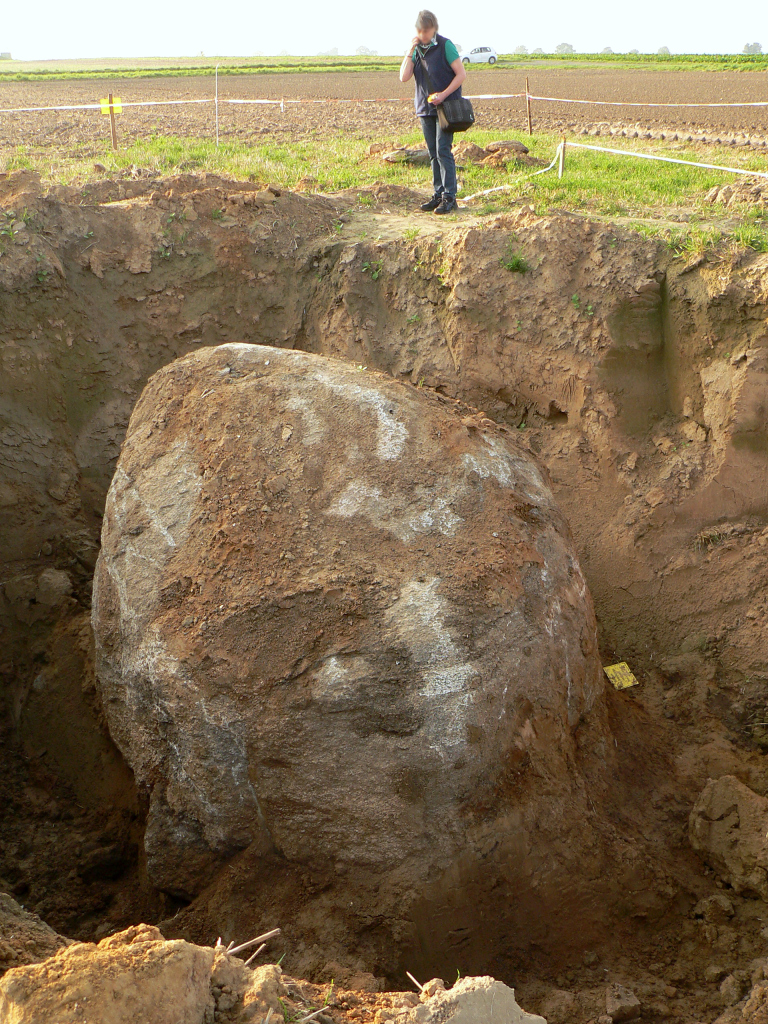 Findling von Ostermunzel auf einem Acker